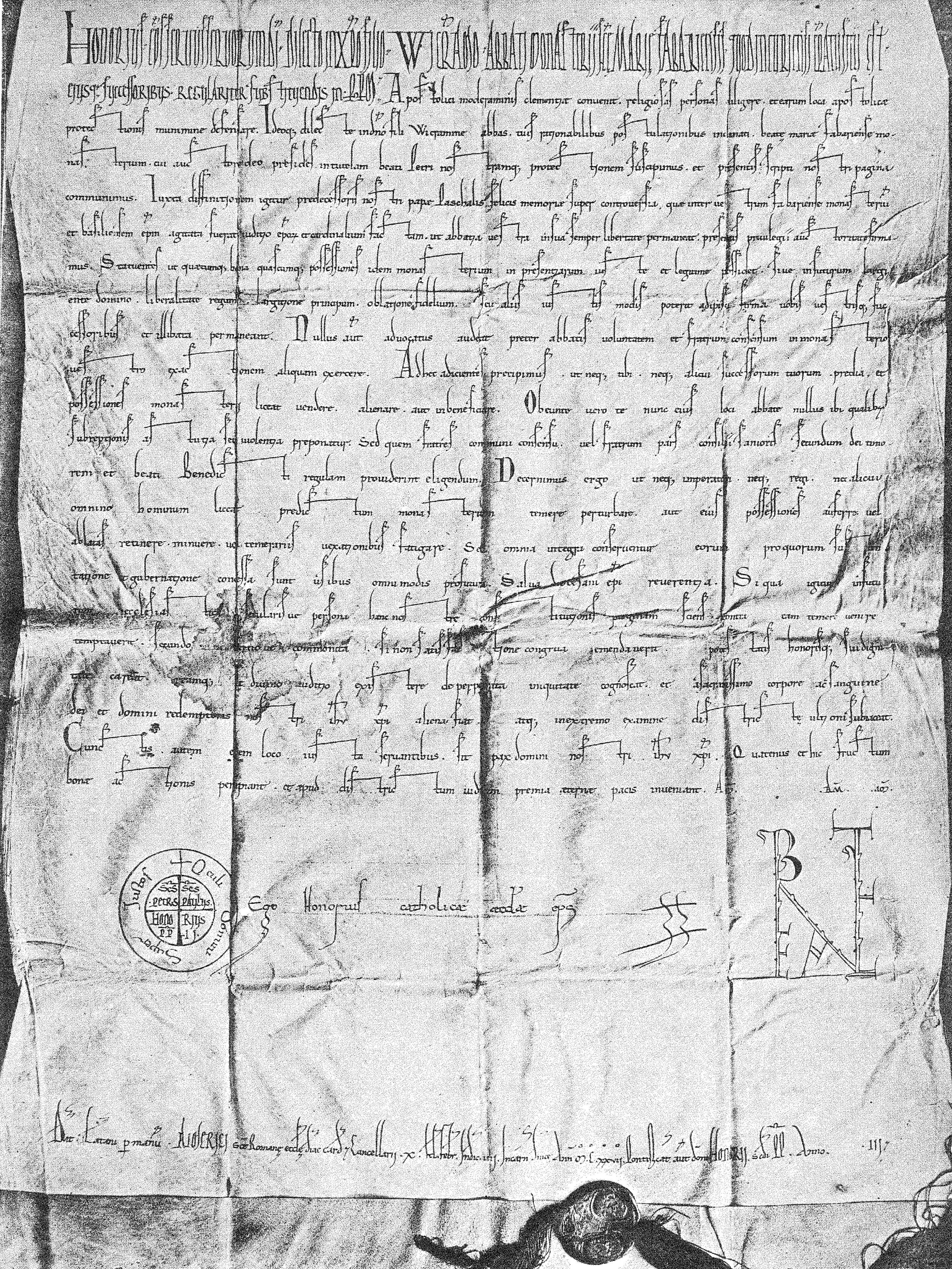 Privilegio solenne di Onorio II del 1127, minuscola diplomatica, San Gallo. Da Franz Steffens, paleographie latin, Champion, Parigi 1910, tav. 80, p. 340